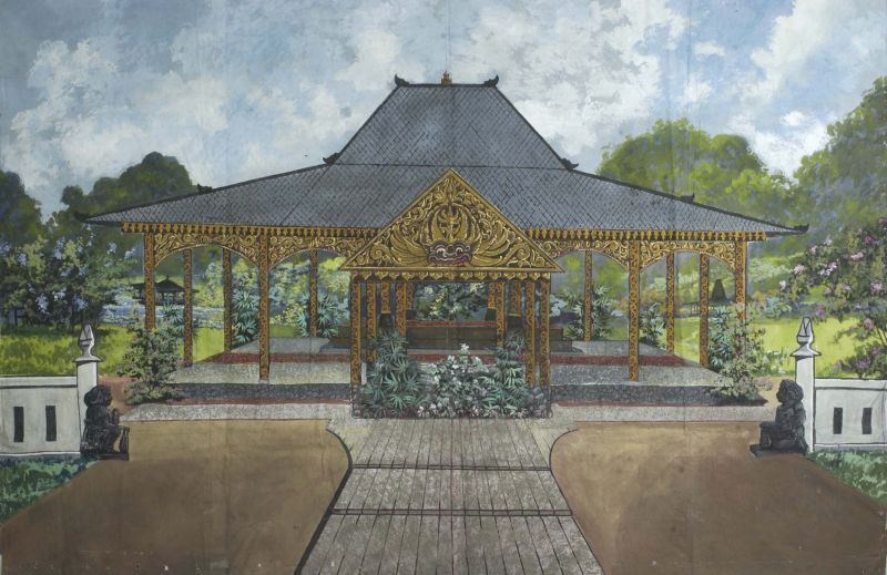 Doek. Voorstellend een traditionele Javaans pendopo met twee wachters (open zuilenpaviljoen met pannendak).. Toneeldoek als achtergrond bij wajang-wong voorstellingen